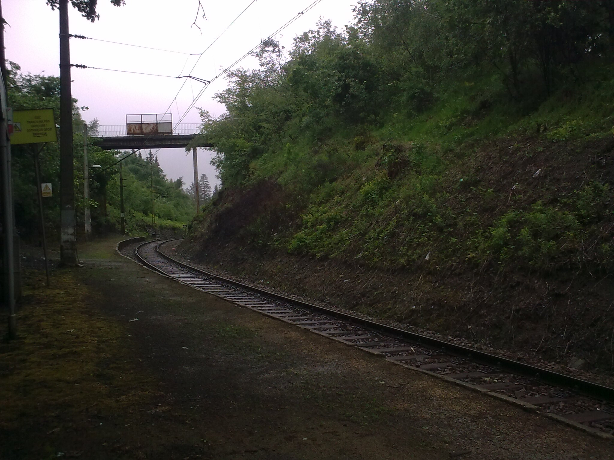 Peron p.o. Pyzówka